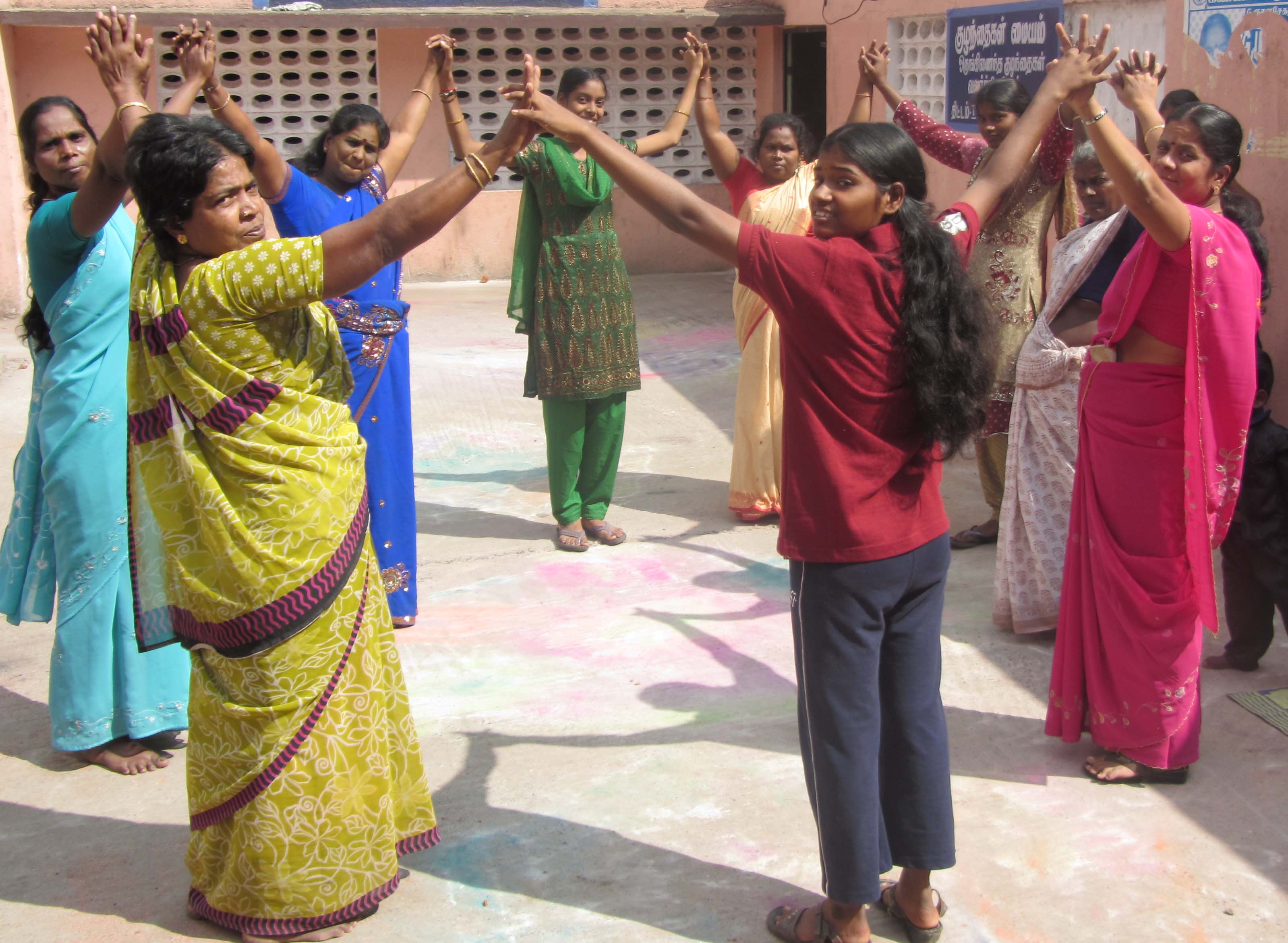 குரவை ஆட்டம். ஆடவரும் மகளிரும் சேர்ந்து ஆடும் பொழுதுபோக்கு நிகழ்ச்சி.